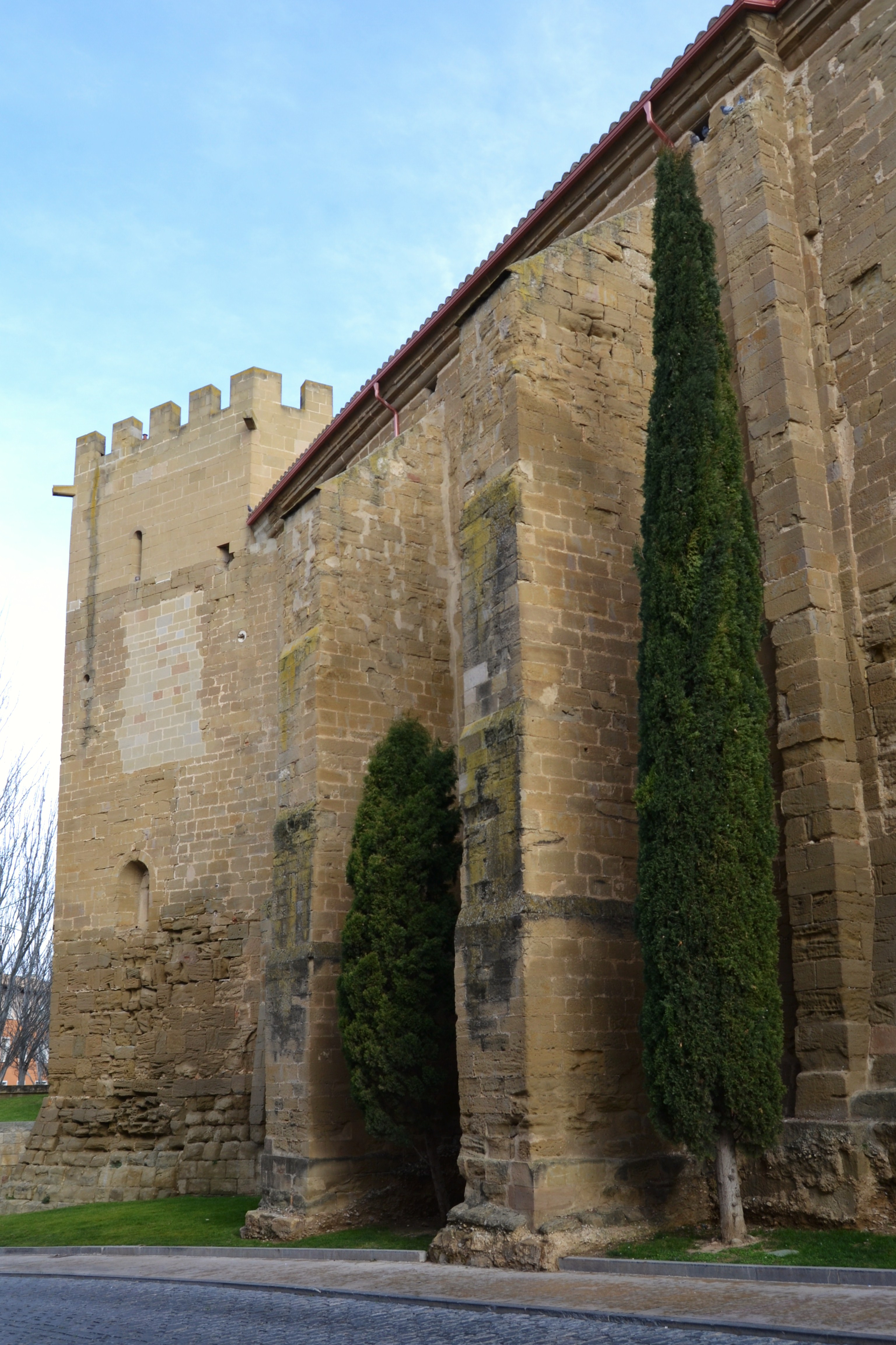 Contraforts i xiprers, palau reial, Osca.